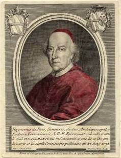 Cardinal Raniero D´Elci